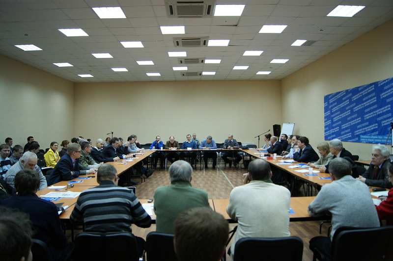 Самарский Гражданский Форум